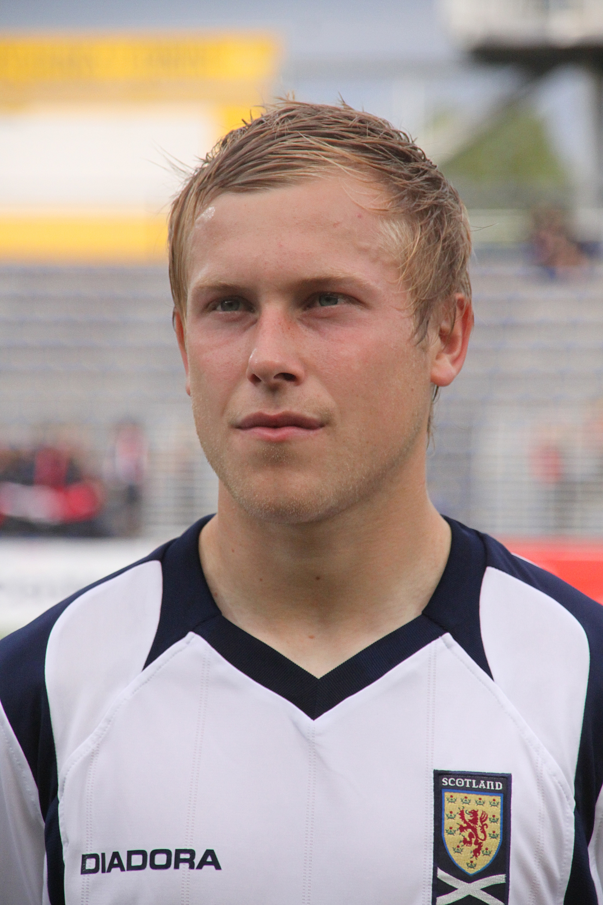 Scott Arfield (FC Falkirk) - Schottische Fußballnationalmannschaft (U-21-Männer) Scott Arfield (Falkirk F.C.) - Scotland national under-21 football team — (1)